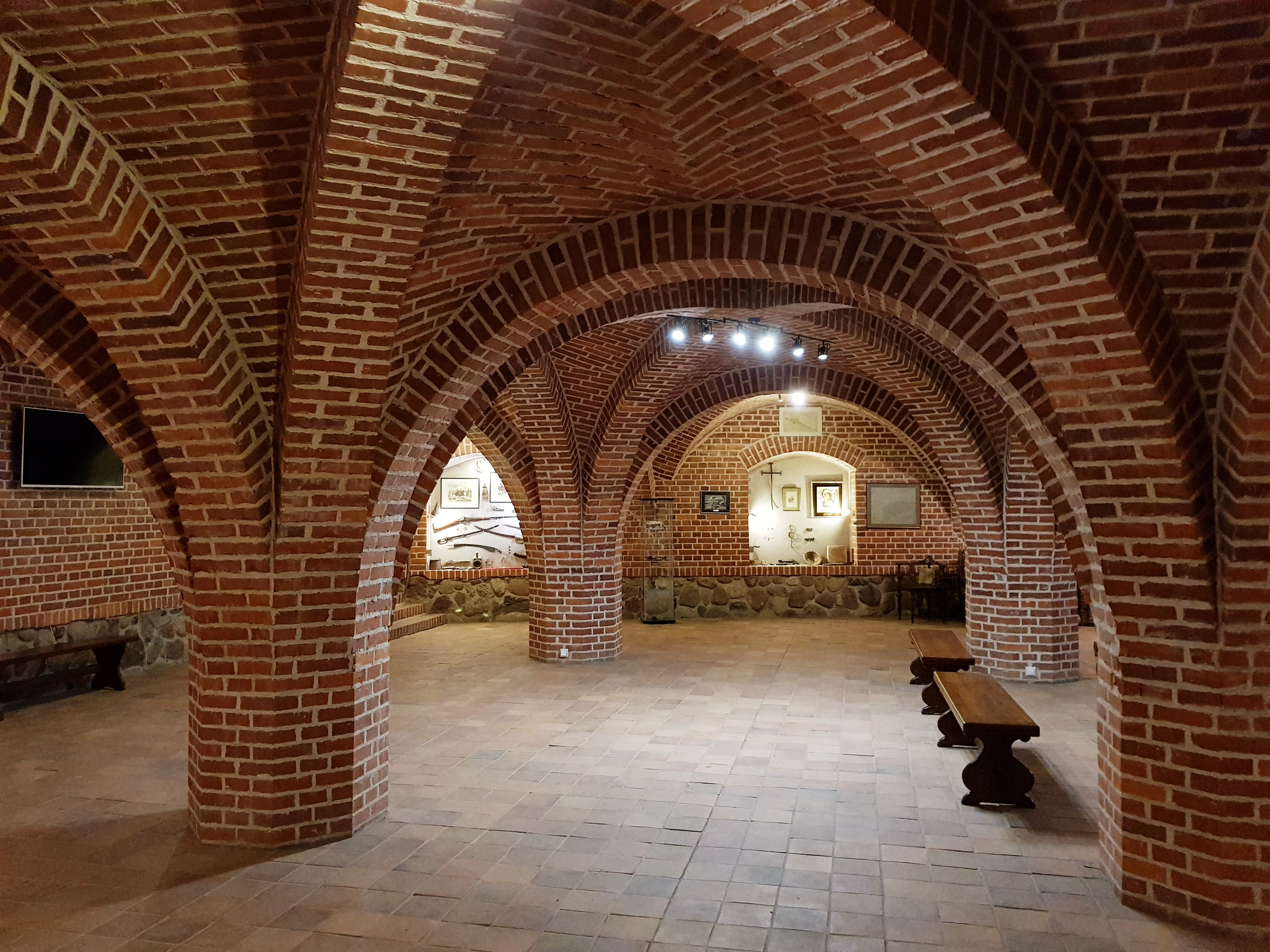 Piwnica muzealna pod kuchnią na zamku w Tykocinie